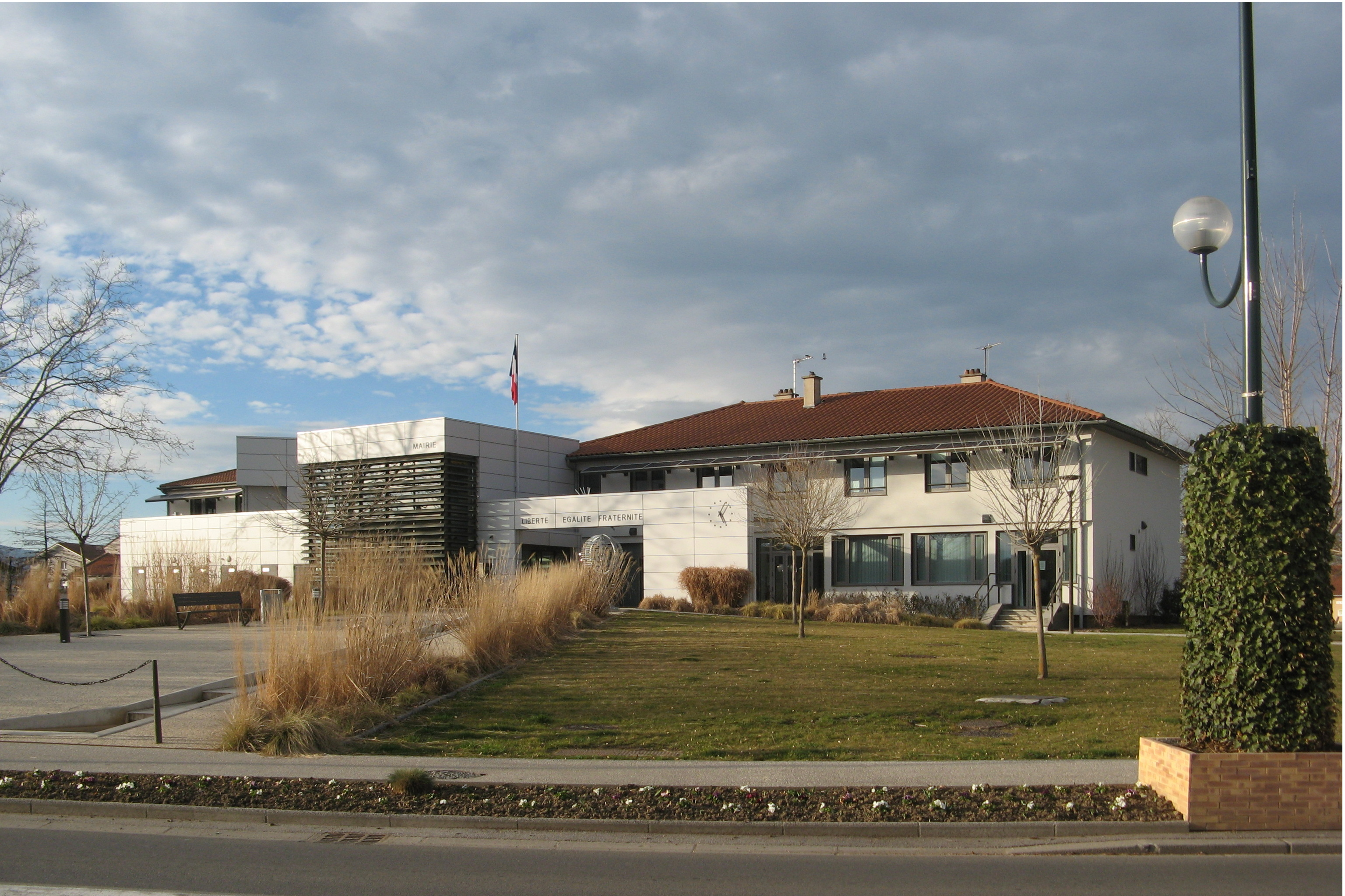 Savigneux (Loire) : mairie